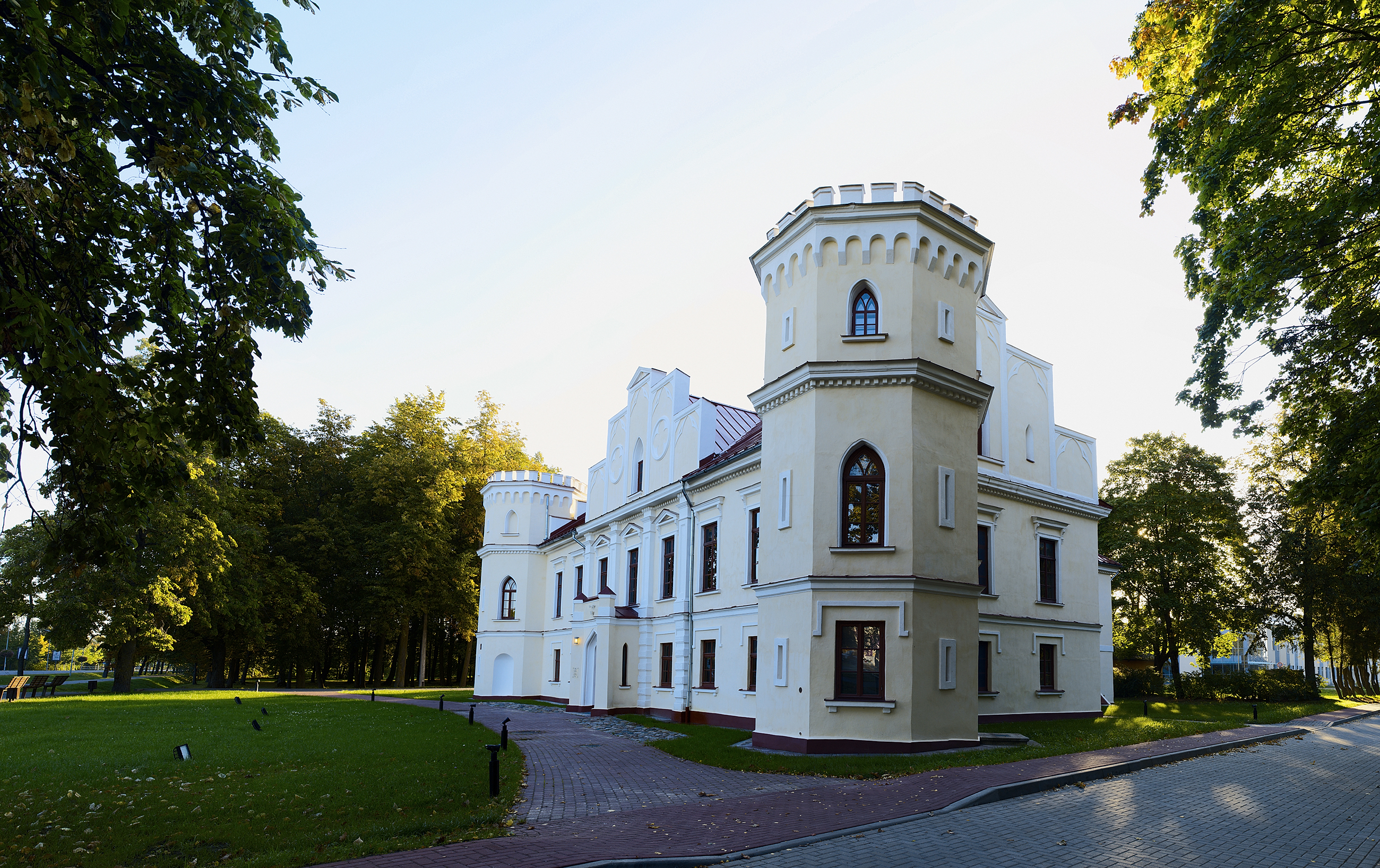 Valdekas pils, Jelgava, Rīgas iela 22